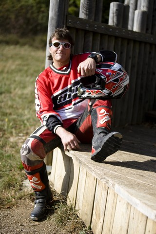 Cross